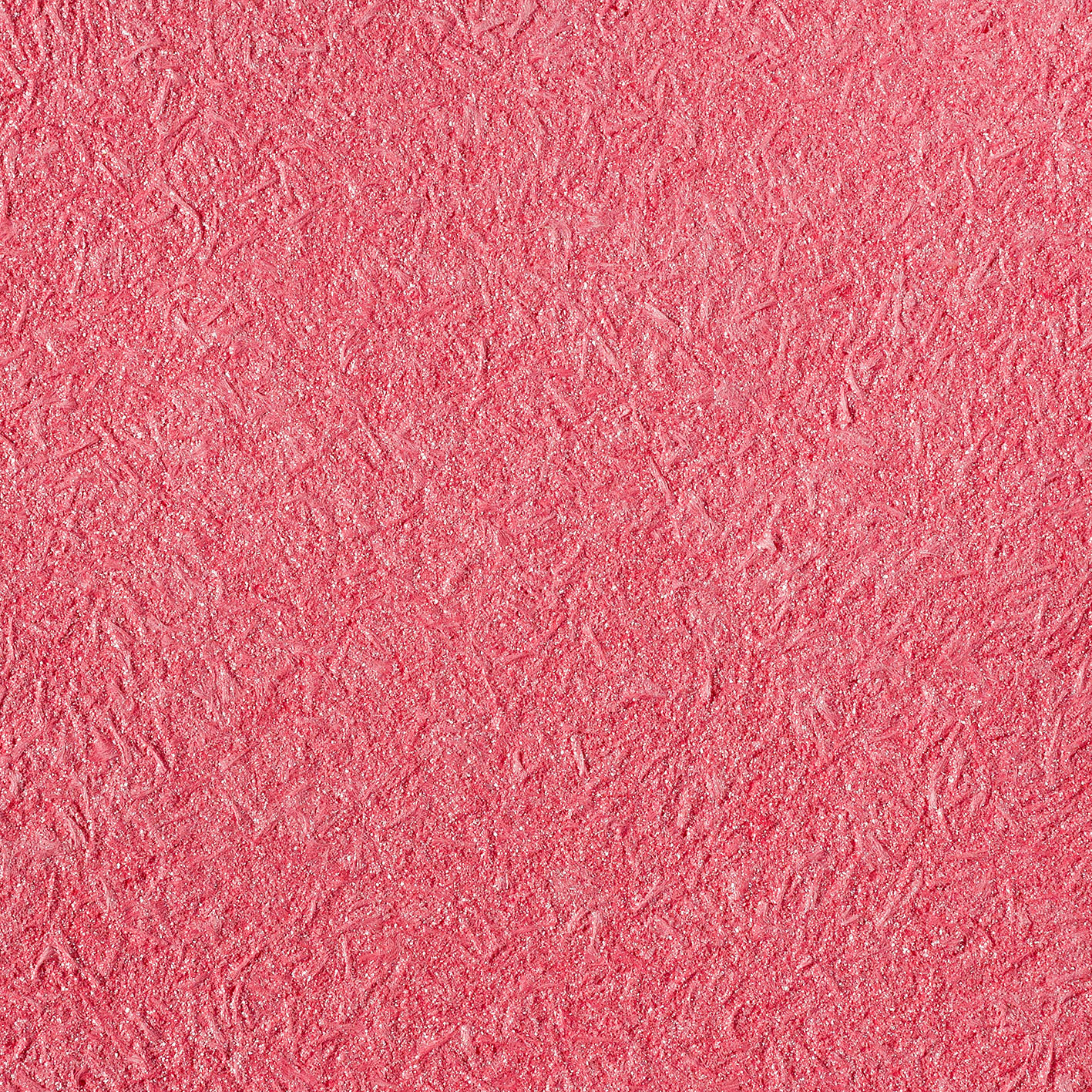 Текстура жидких обоев.